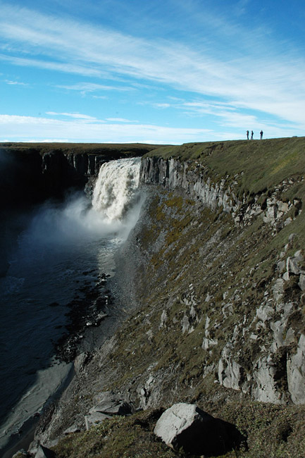 Kringilsárfoss eða Töfrafoss í Kringilsá 4. september 2005 - þessi mynd er tekin af mér (is:notandi:oliagust)